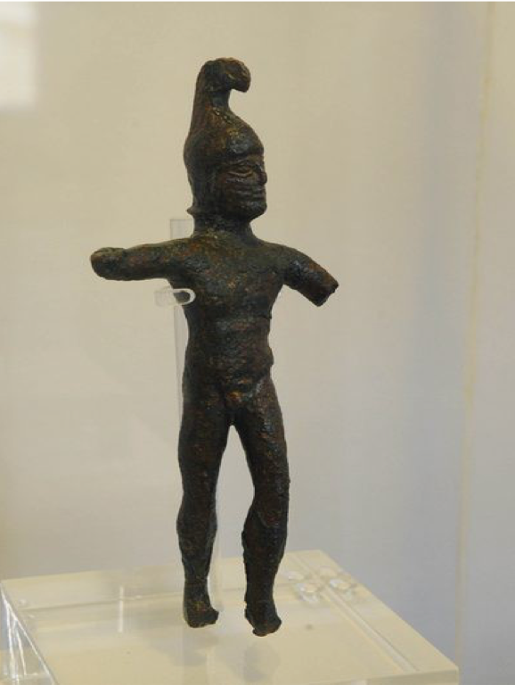 Figureta de Mars Balearicus de Son Gall (Alaior,Menorca)